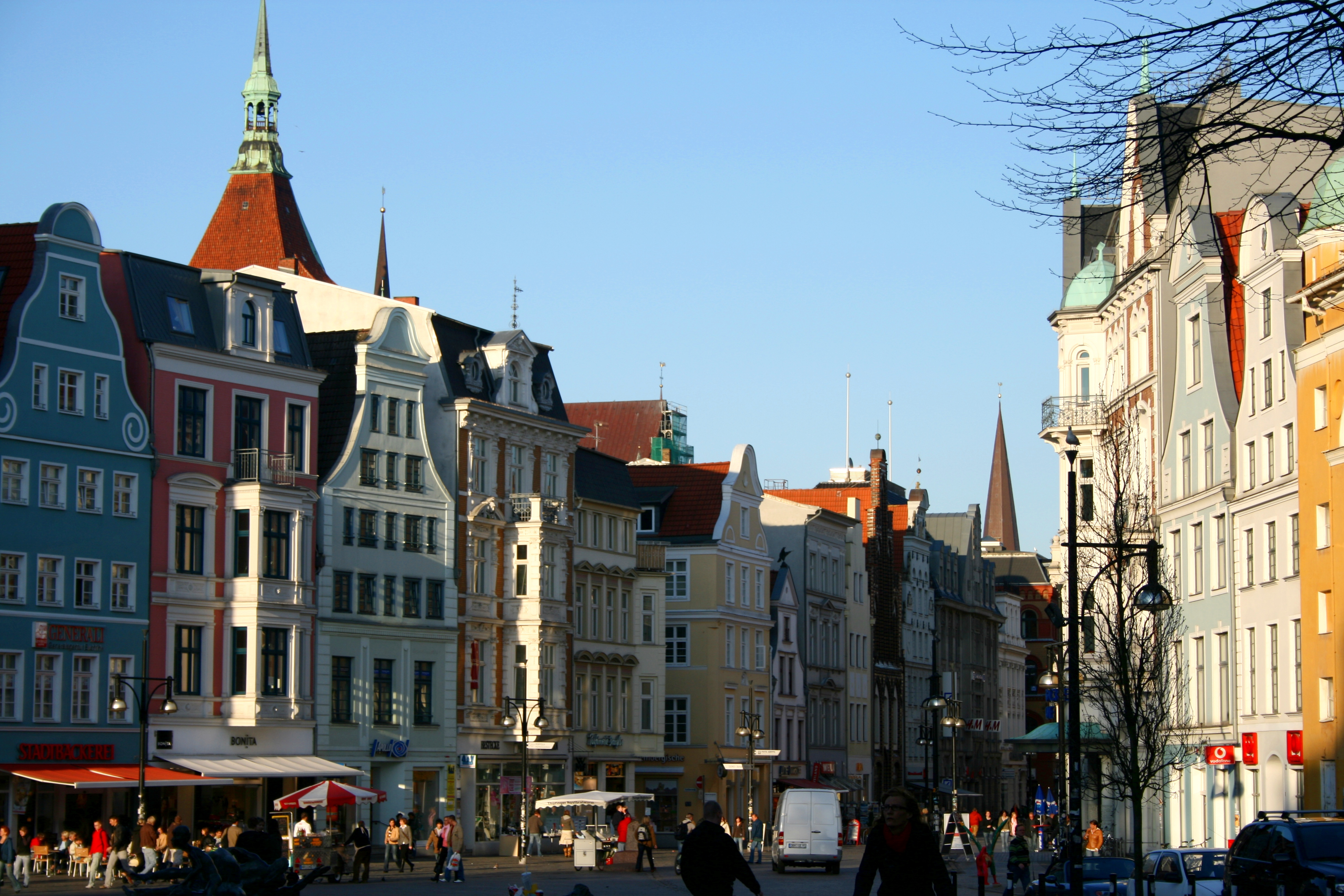 Rostock (Germany), Kröpeliner Straße